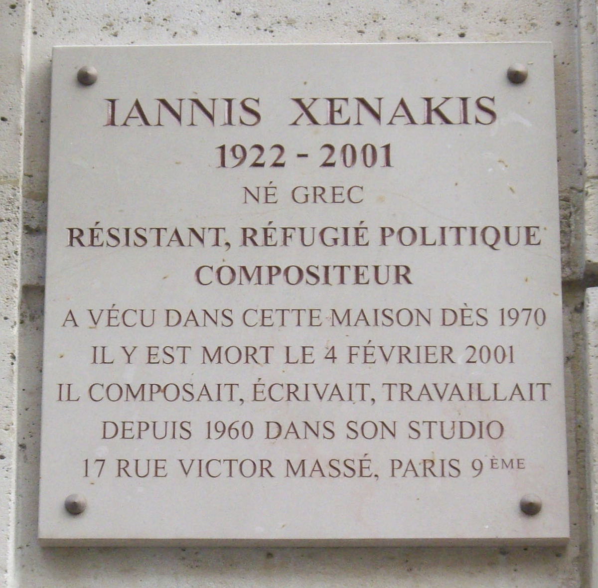 Plaque commémorative, 9 rue Chaptal, Paris 9e.« Iannis Xenakis, 1922-2001, né grec, résistant, réfugié politique, compositeur, a vécu dans cette maison dès 1970. Il y est mort le 4 février 2001. Il composait, écrivait, travaillait depuis 1960 dans son studio, 17 rue Victor Massé, Paris 9e. »